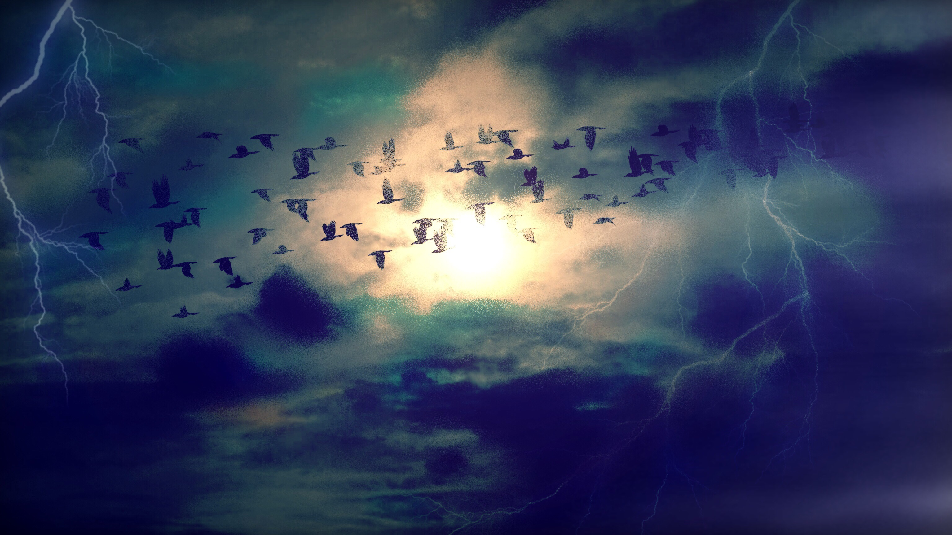 Zugvögel im Gewitter